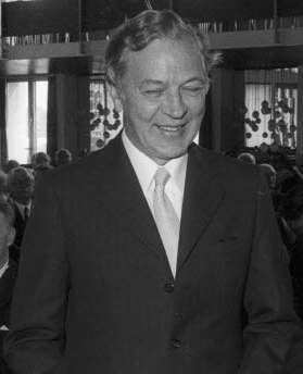 Preisträger sind der Tierzüchter Prof. Dr. Harald Skjervold aus Norwegen (Mitte) und der Landwirt Klaus Kleeberg aus Eisbergen bei Minden (rechts). Prof. Dr. Ekkehard Riebe, Dekan der Agrarwissenschaftlichen Fakultät der Christian-Albrechts-Universität (CAU), überreicht die Preise.